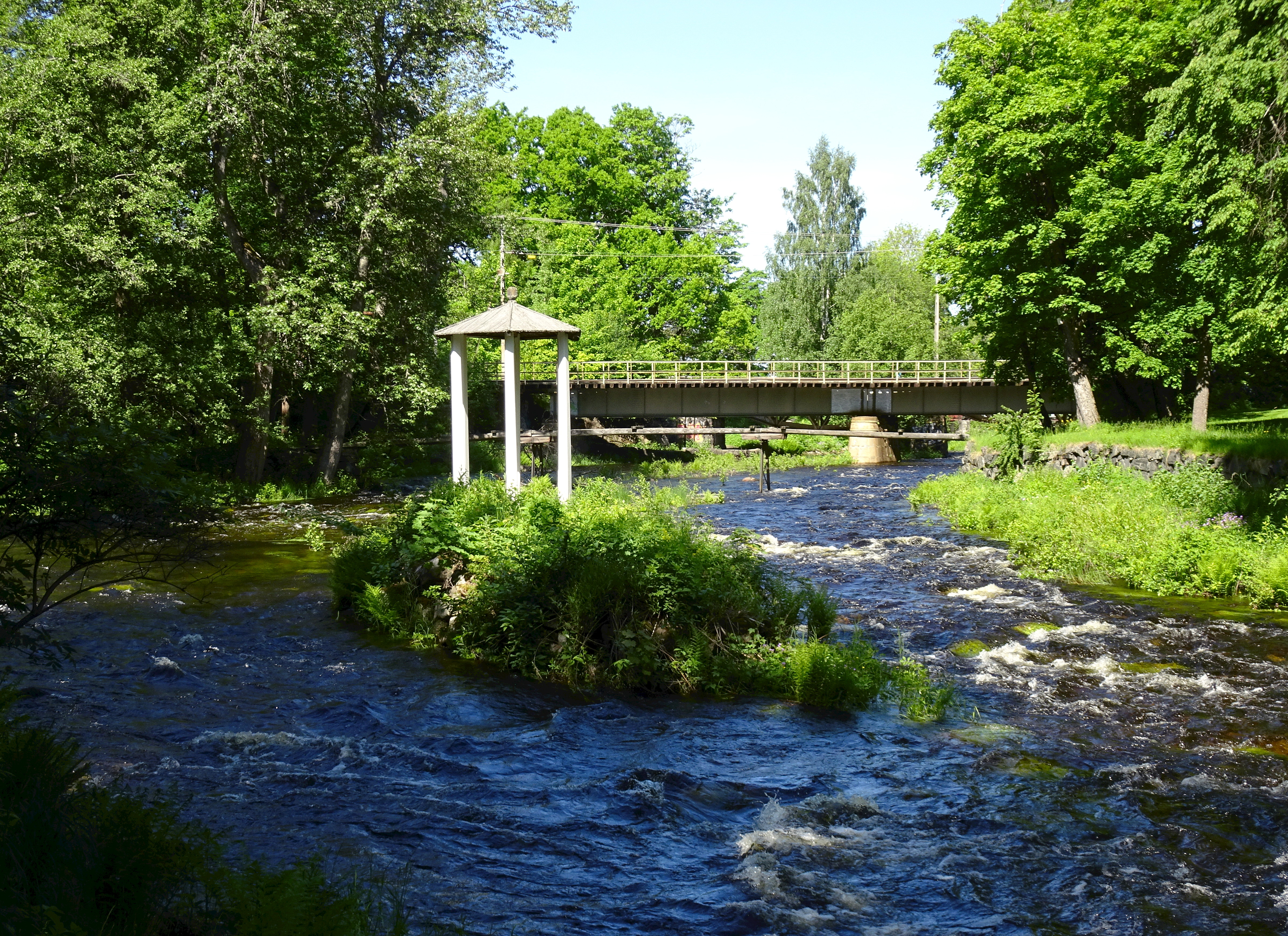 Ludvika ström med fullt vattenpådrag